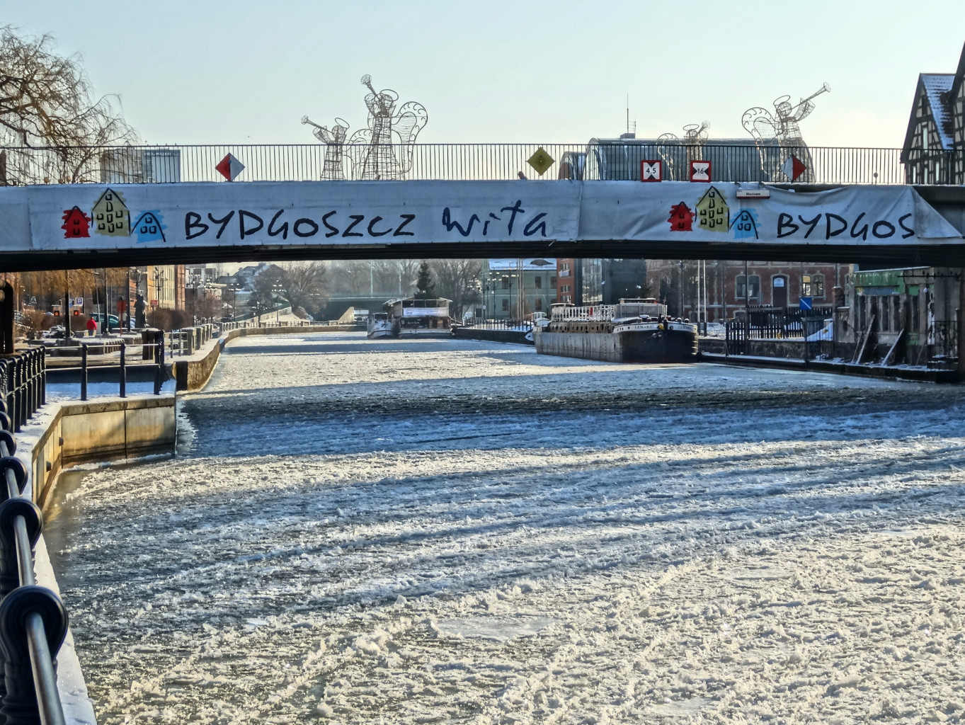 Most Staromiejski im. Jerzego Sulimy-Kamińskiego w Bydgoszczy